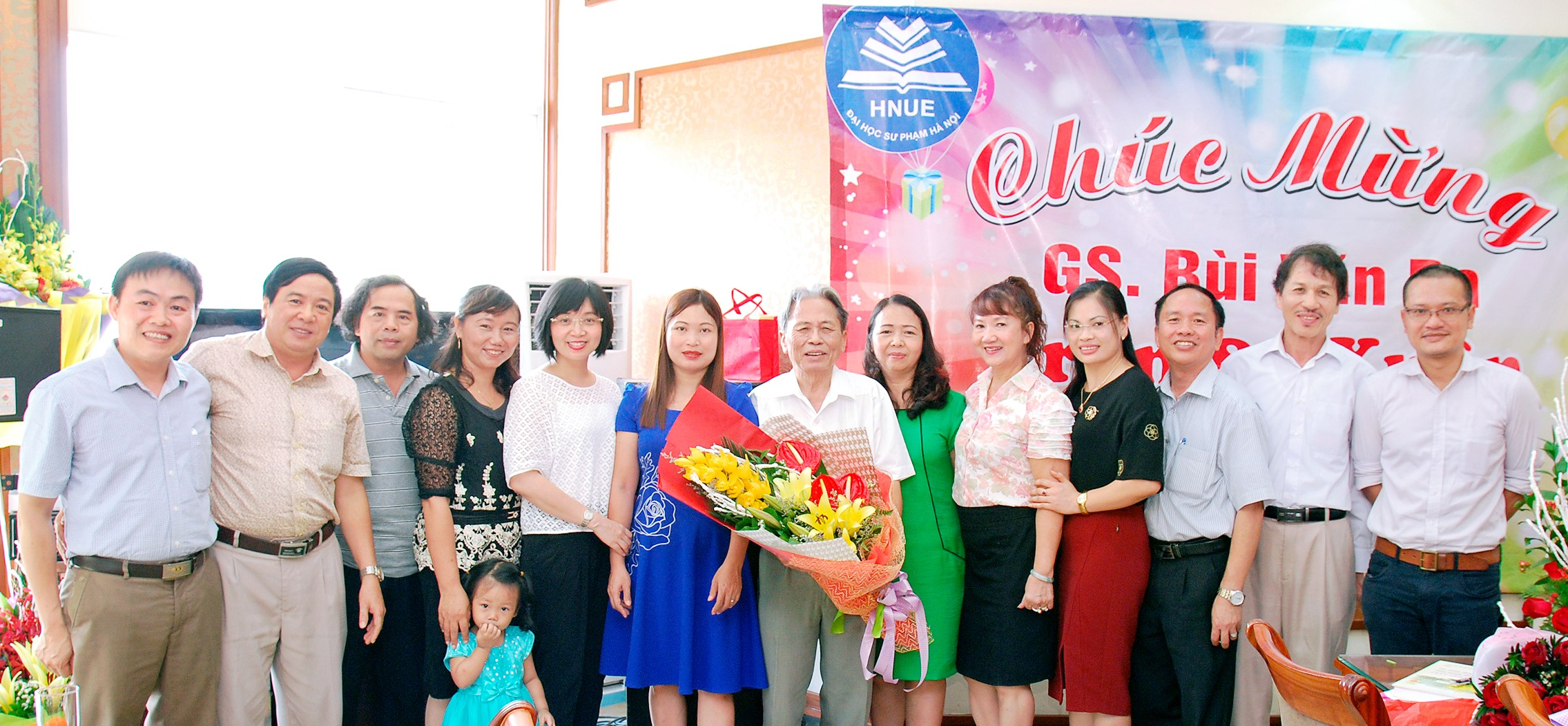 Mừng GS Phương Lựu 80 tuổi